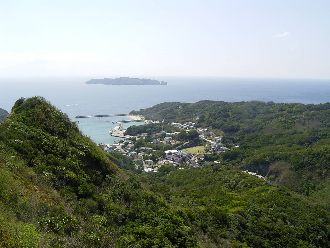 剣先山(東京都小笠原村 母島)より沖港を望む, Oki on Hahajima Island